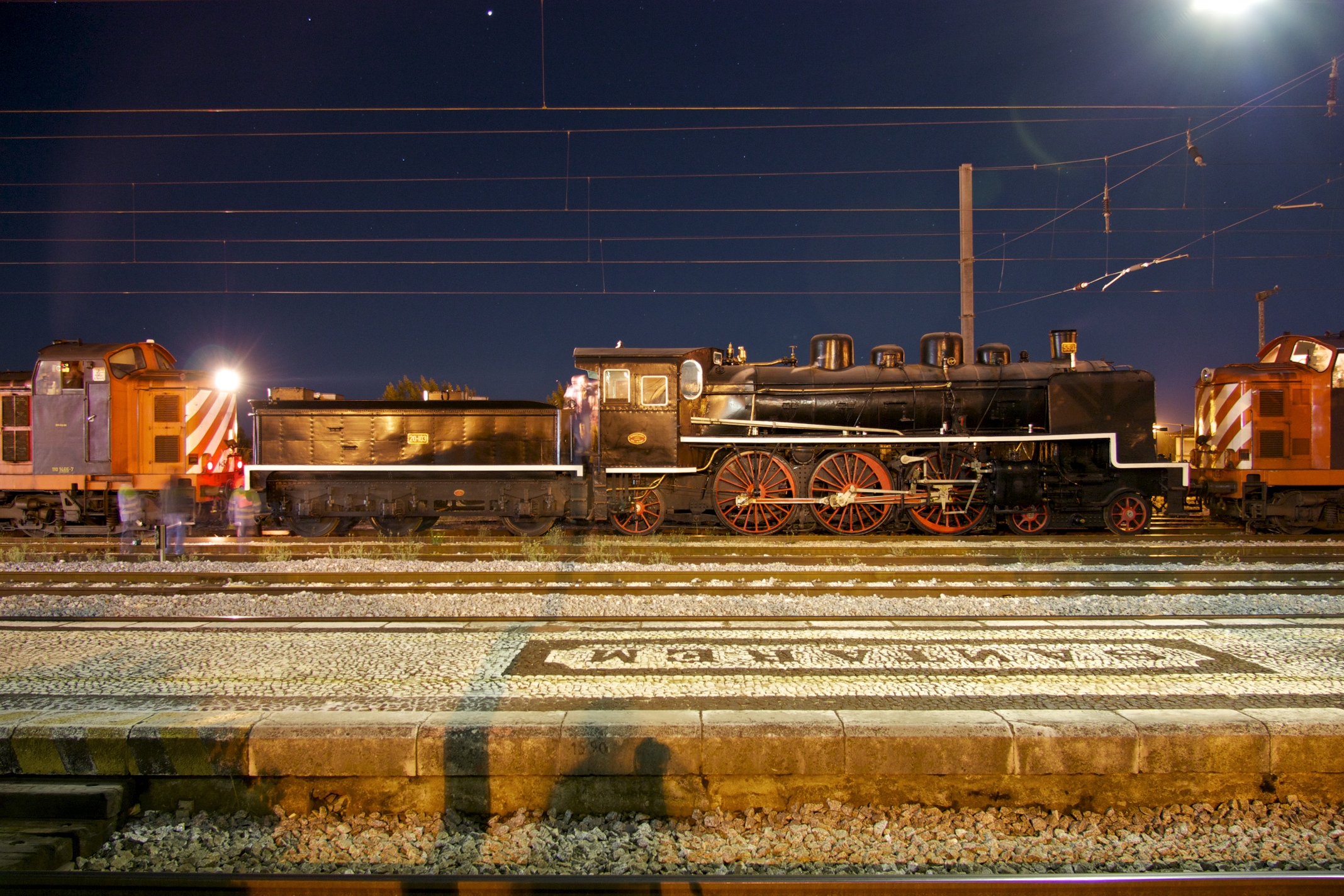 Local: Estação de Santarém [Linha do Norte, PK 74] Data e hora: 30 de Setembro de 2012 [00h50] Material: Locomotiva 553 (ex-CFS 303 e ex-CP/SS 1503) Henschel 4-6-2, 1924] som desta fotografia aqui | this image's sound here. publicada na plataforma | published in Trainspo. [PT] A locomotiva 553 em preparações para a marcha 31601 [Santarém - Entroncamento]. [ENG] CP 553 being hauled to Entroncamento.